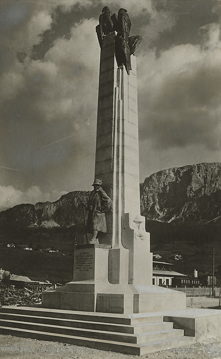 Cortina d'Ampezzo. Monumento al generale Cantore